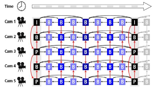 prediccio mvc